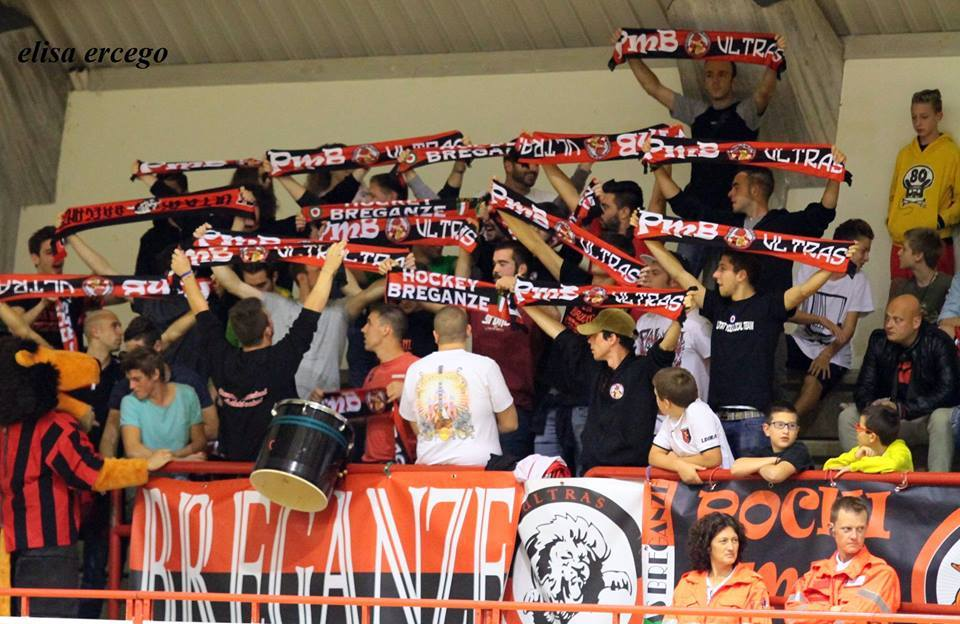 Ultras breganzesi